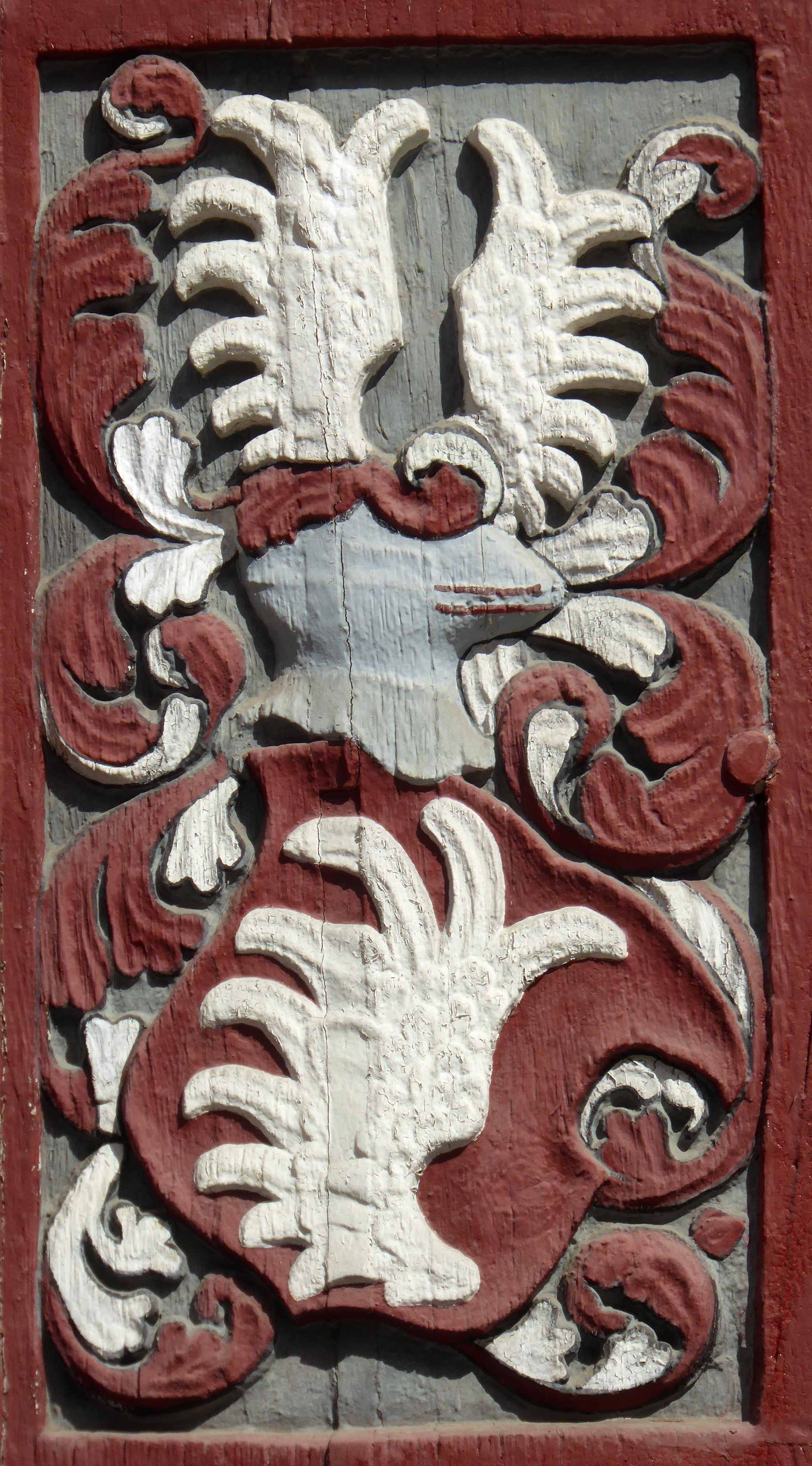 Wappen der Familie Swanenflogel (Schwanenflügel) oben neben der Toreinfahrt der Junkernschänke in Göttingen (Südniedersachsen), Barfüßerstraße 5